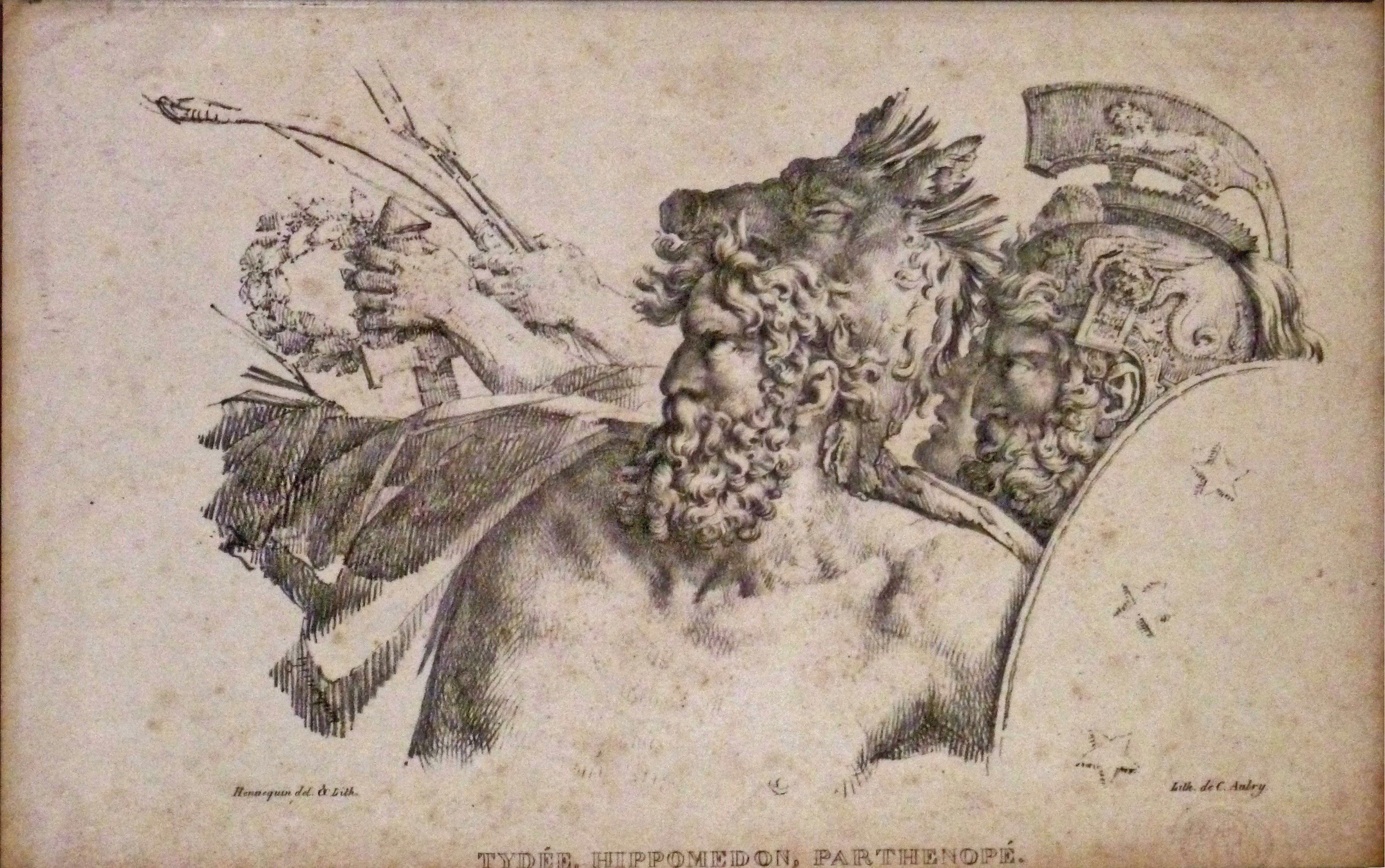 "Tydeus, Hippomedon, Parthenopeus", 19de eeuwse gravure; gedrukt door Hennequin; privébezit